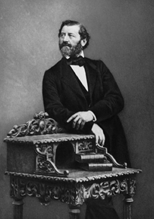 Agénor de Gasparin, député de Corse, écrivain protestant, anti-esclavagiste